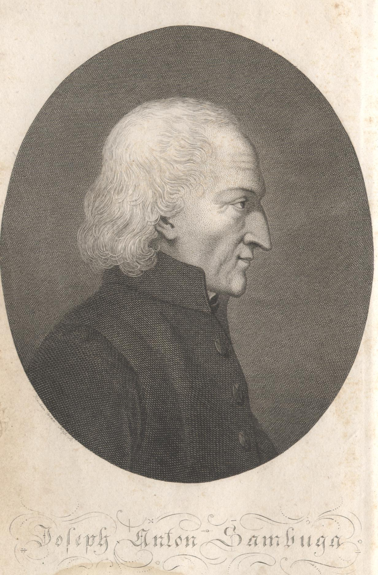 Stich